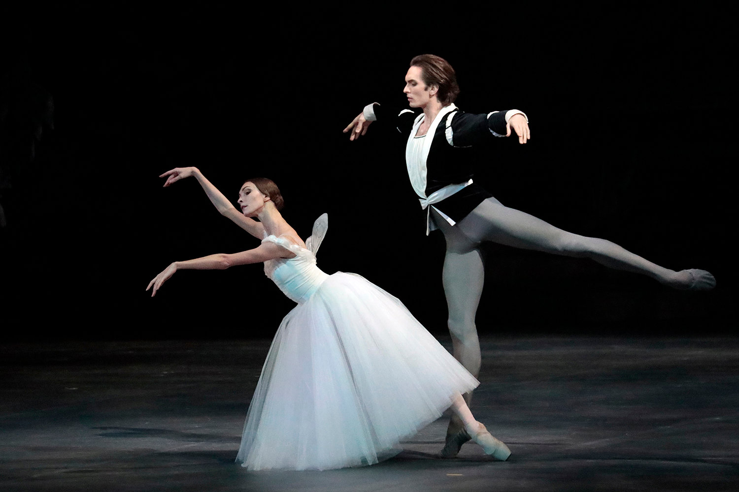 Жиѕел